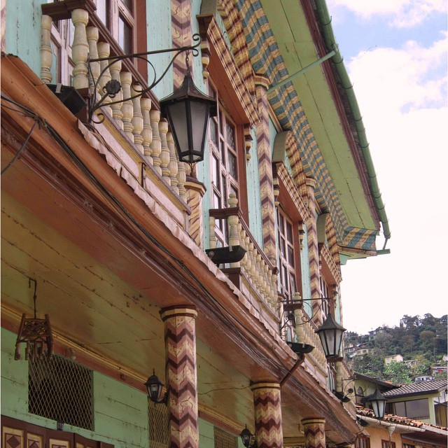 Casa colonial de Zaruma en la Provincia de El Oro